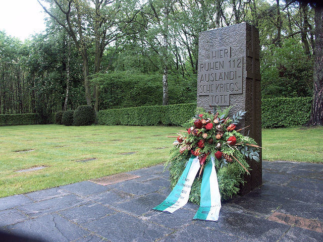 Gedenkstätte für die Opfer des Zweiten Weltkrieges in Rösrath Steininschrift am Eingang des Friedhofs: "Hier befand sich im Zweiten Weltkrieg das Kriegsgefangenenlager Hoffnungsthal, in dem Menschen verschiedener Nationalitäten Opfer von Hunger, Krankheit und Gewalt wurden. Ihre Leiden und ihr Tod mahnen zum Frieden."